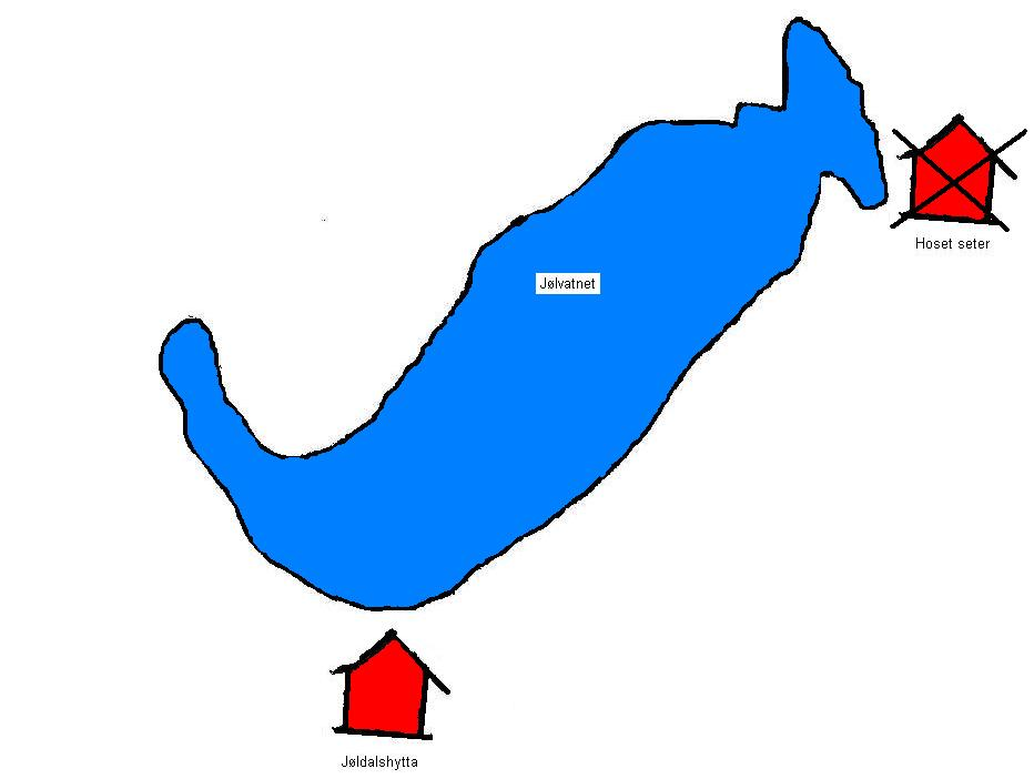 Drawn sketch of Jølvatnet, Hosetsetra and Jøldalshytta